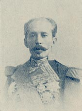 Máximo Tajes (1852 - 1912), político uruguayo, presidente de ese país entre 1886 y 1890.